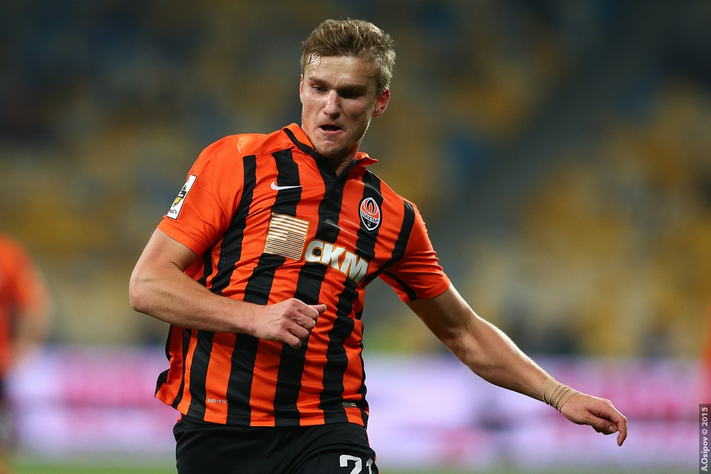 16.10.2015 г.Киев. НСК "Олимпийский". 11-й тур Лиги Пари-Матч. Динамо Киев - Шахтер Донецк - 0:3